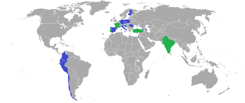 Operadores actuales en Azul. Posibles operadodes en verde.